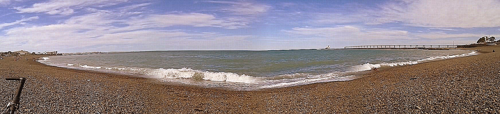 La playa de km3 con cantos rodados